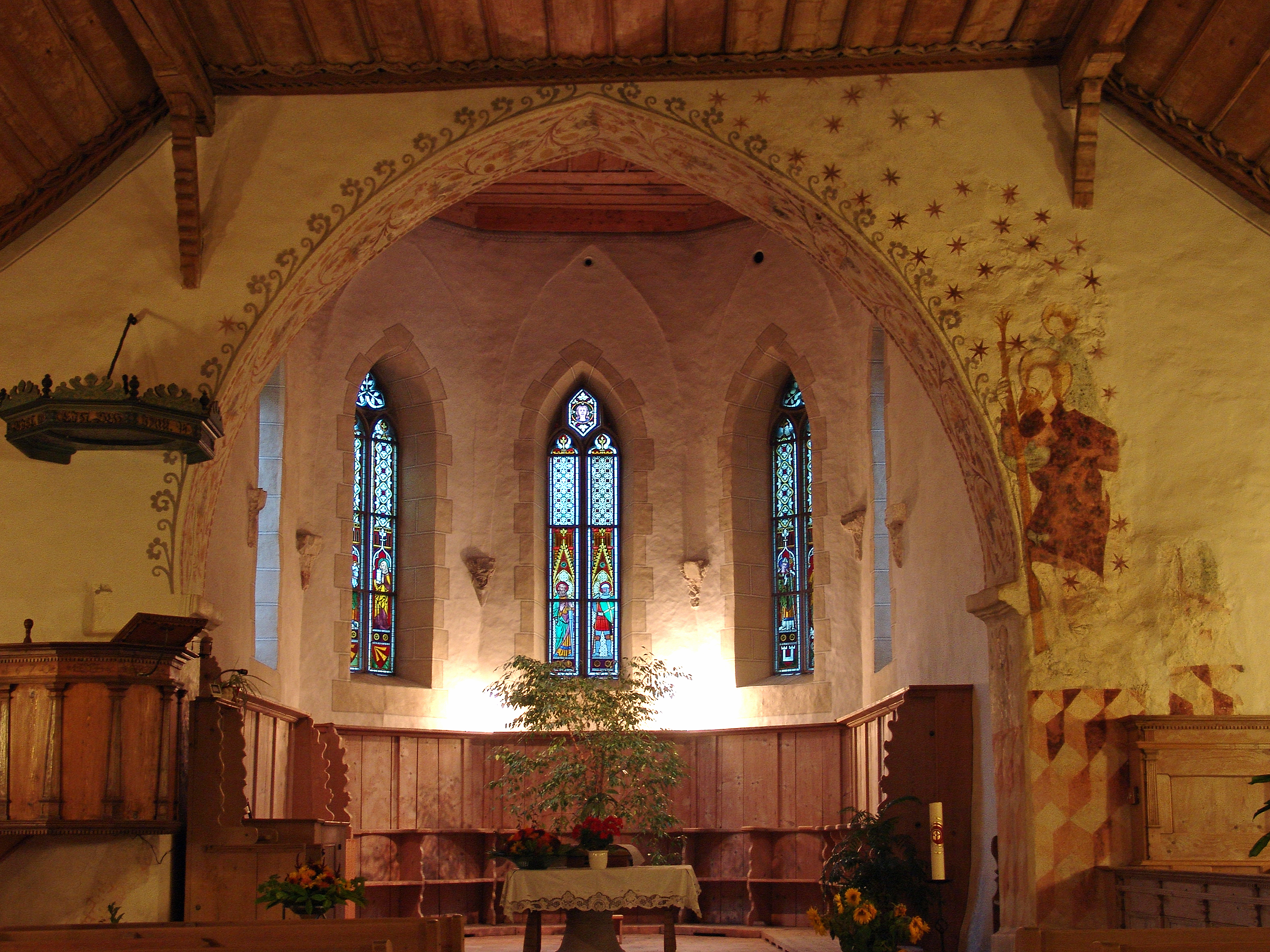 Reformierte Kirche Blumenstein, Innenansicht